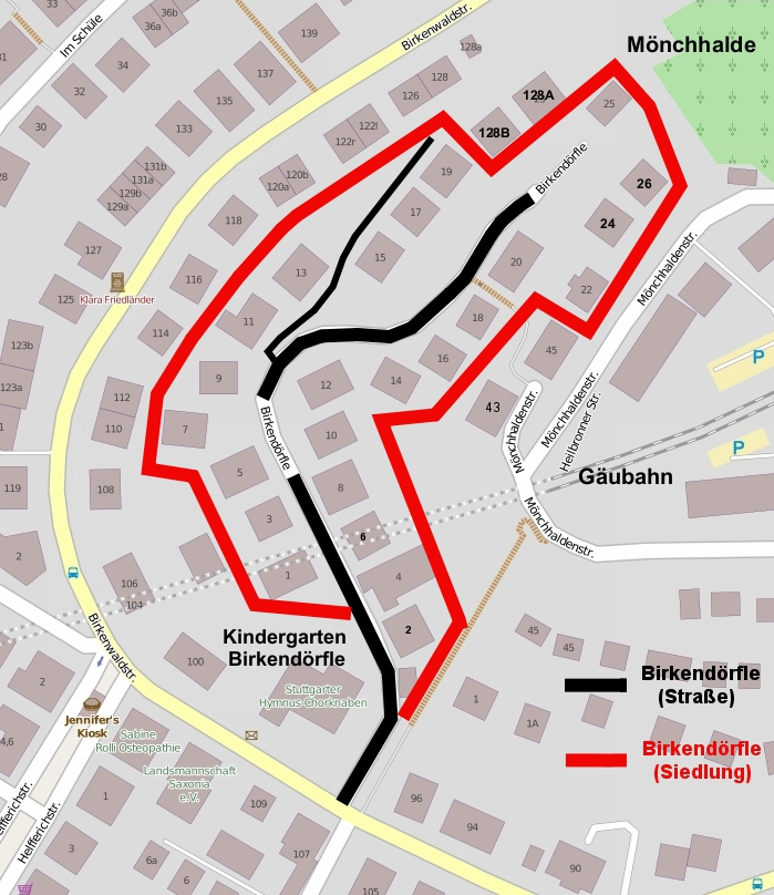 Lageplan des Birkendörfle in Stuttgar, 2014.